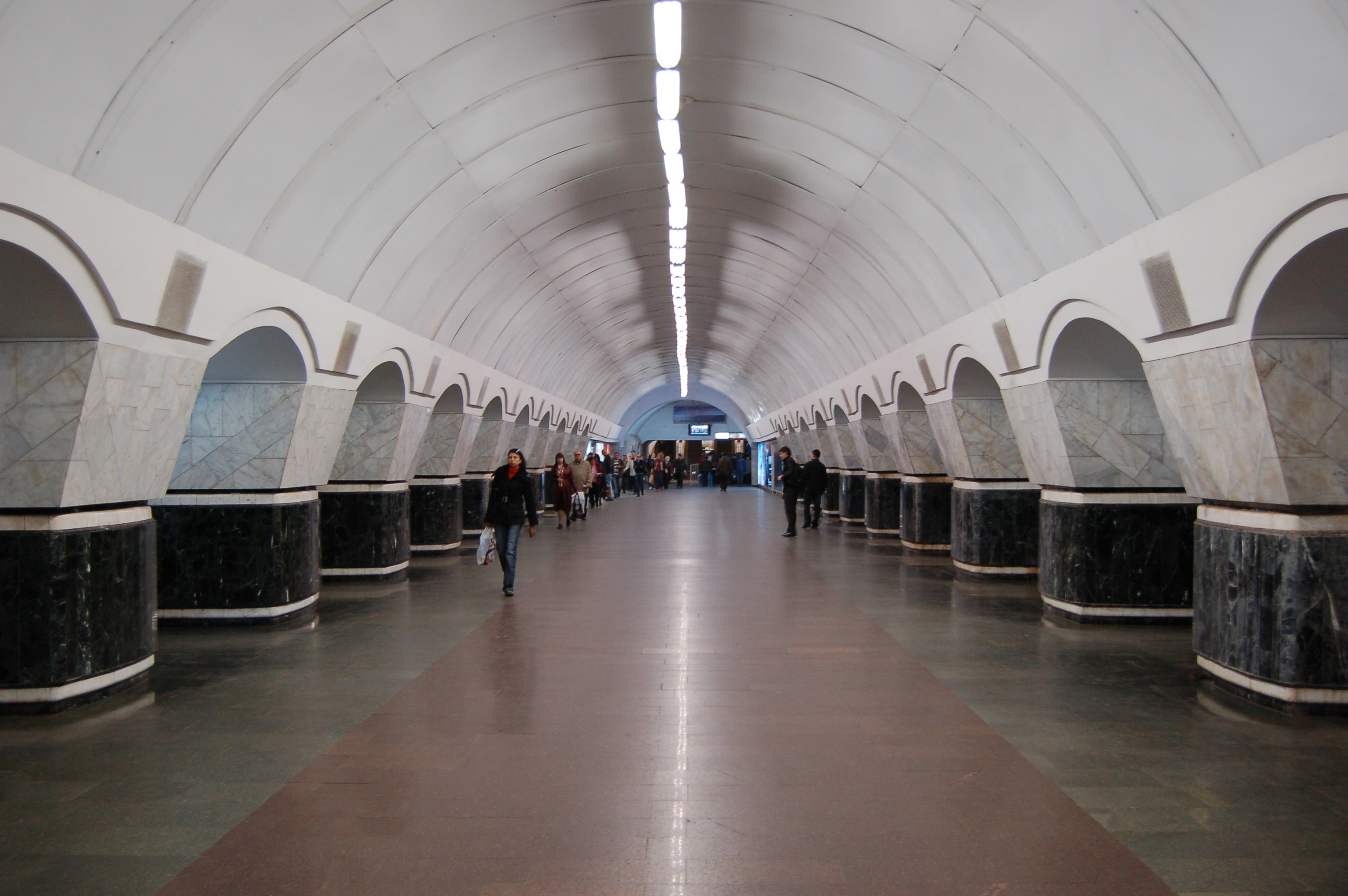 Cтанция метро «Лукьяновская», центральный зал